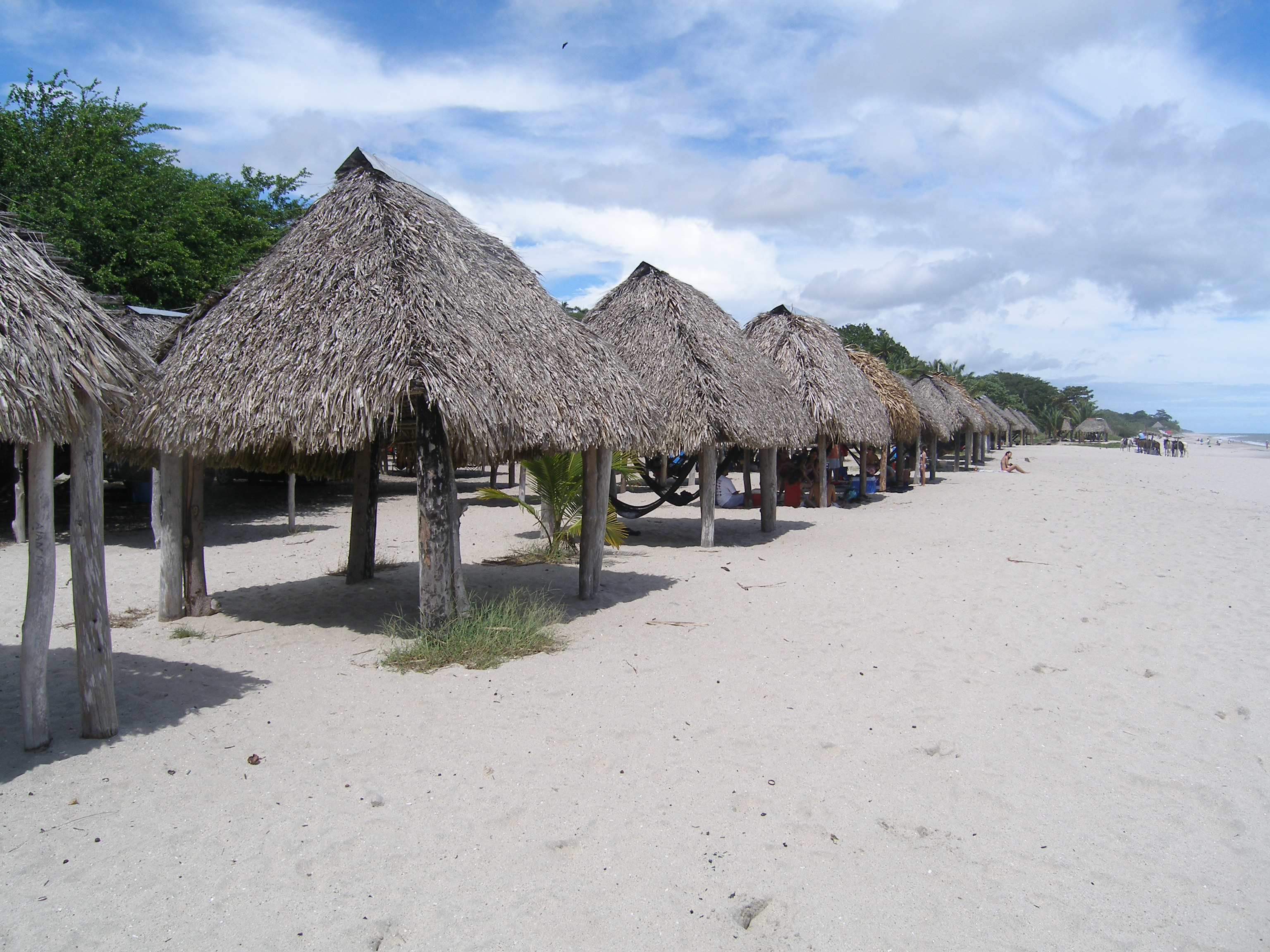 Ranchos turísticos a la orilla de la playa Santa Clara, Coclé